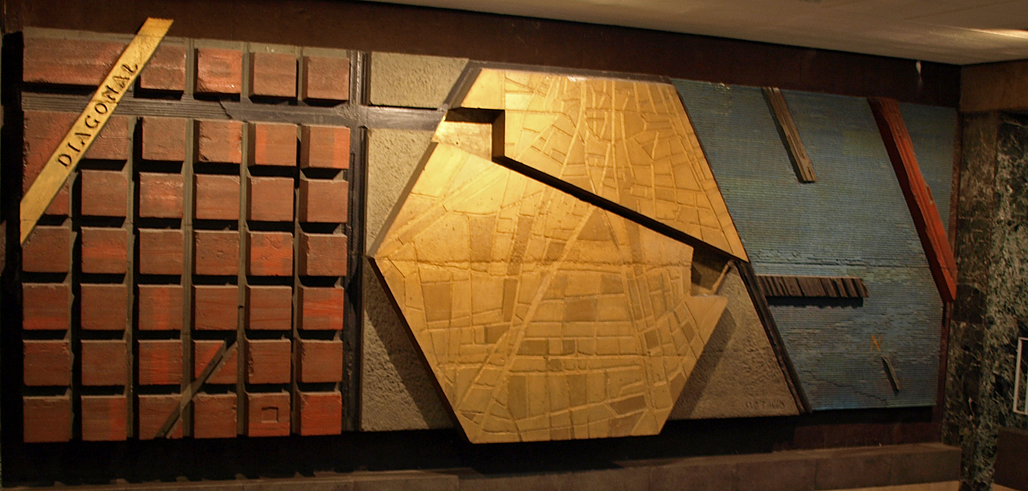 L'Eixample (Josep Maria Subirachs, 1969). Obra ubicada en el acceso de la estación de metro Diagonal de la L3, en del Paseo de Gràcia.